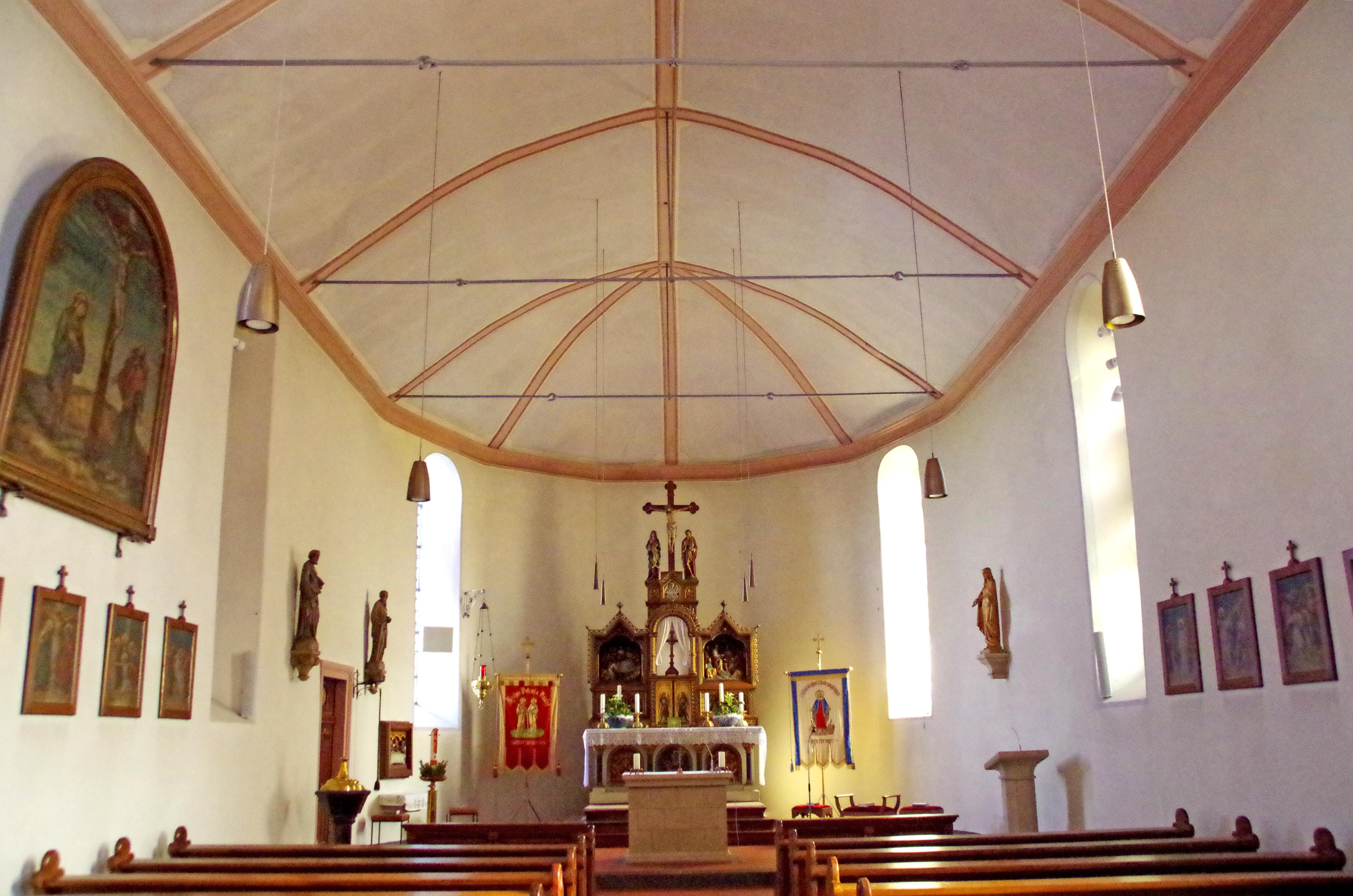 St. Peter und Paul (Blankenheimerdorf), Blick ins Kirchenschiff